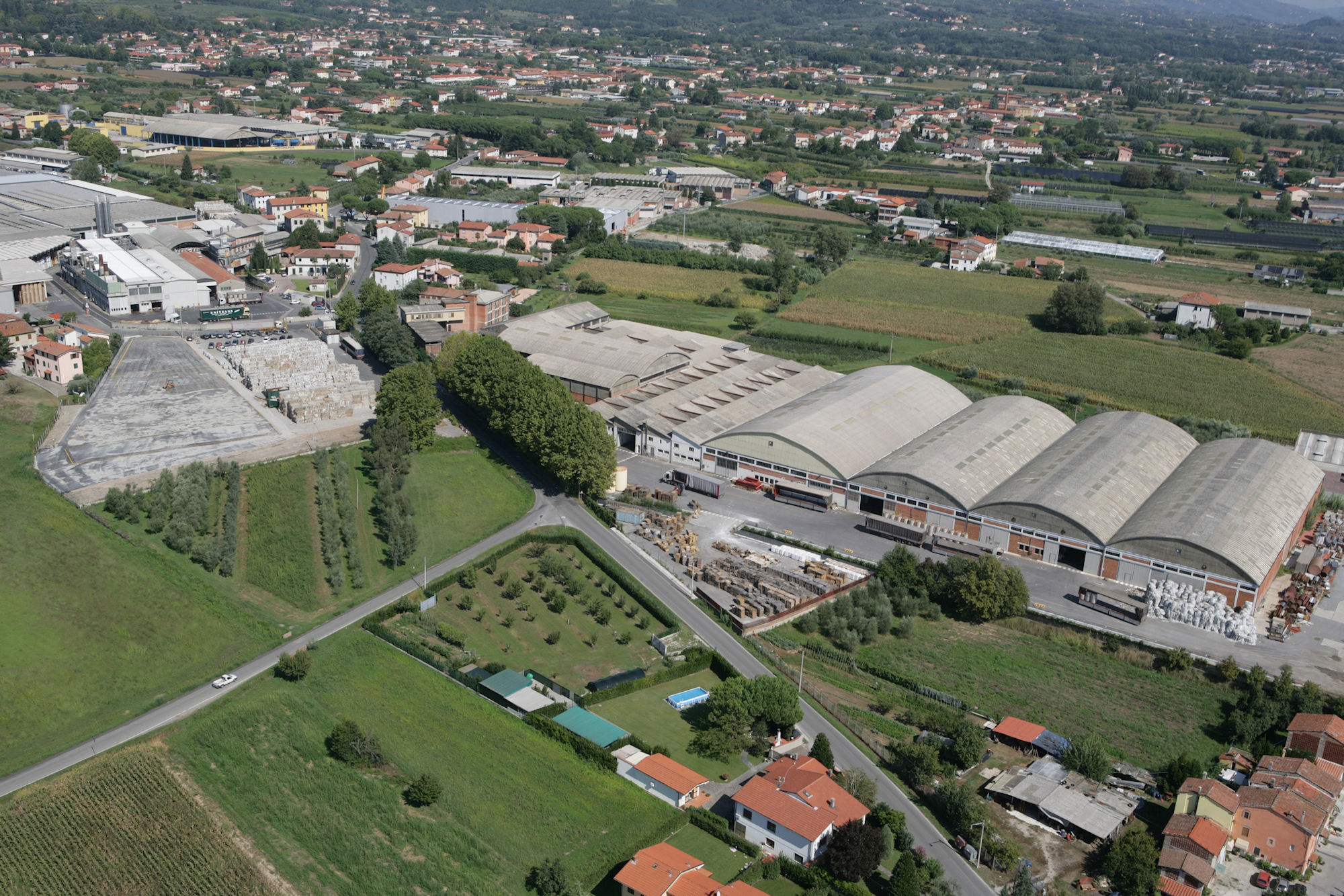 Foto aerea degli stabilimenti della industria cartaria Pieretti. La via principale (che corre da destra a sinistra della foto) è Via del Fanuccio che incrocia con Via delle Piagge Seconda (la strada che si innesta sulla sinistra). La strada si trova a Marlia di Capannori (Lucca).